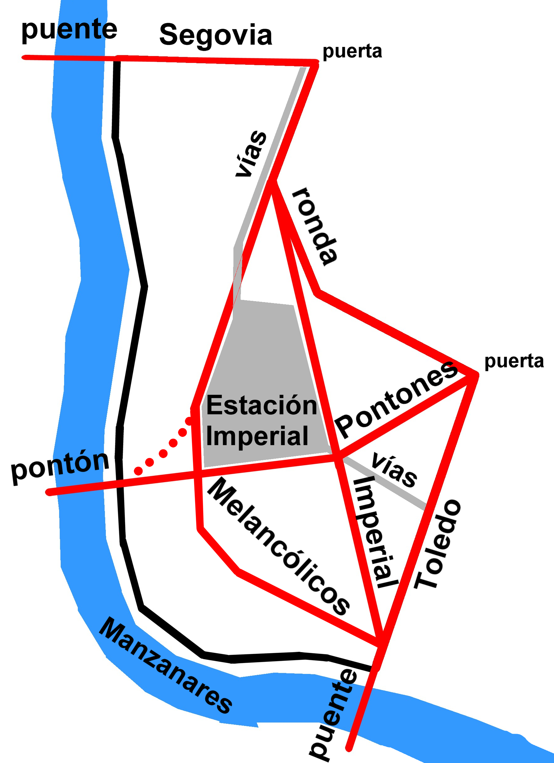 Esquema del barrio de Imperial. Arganzuela. Madrid. España